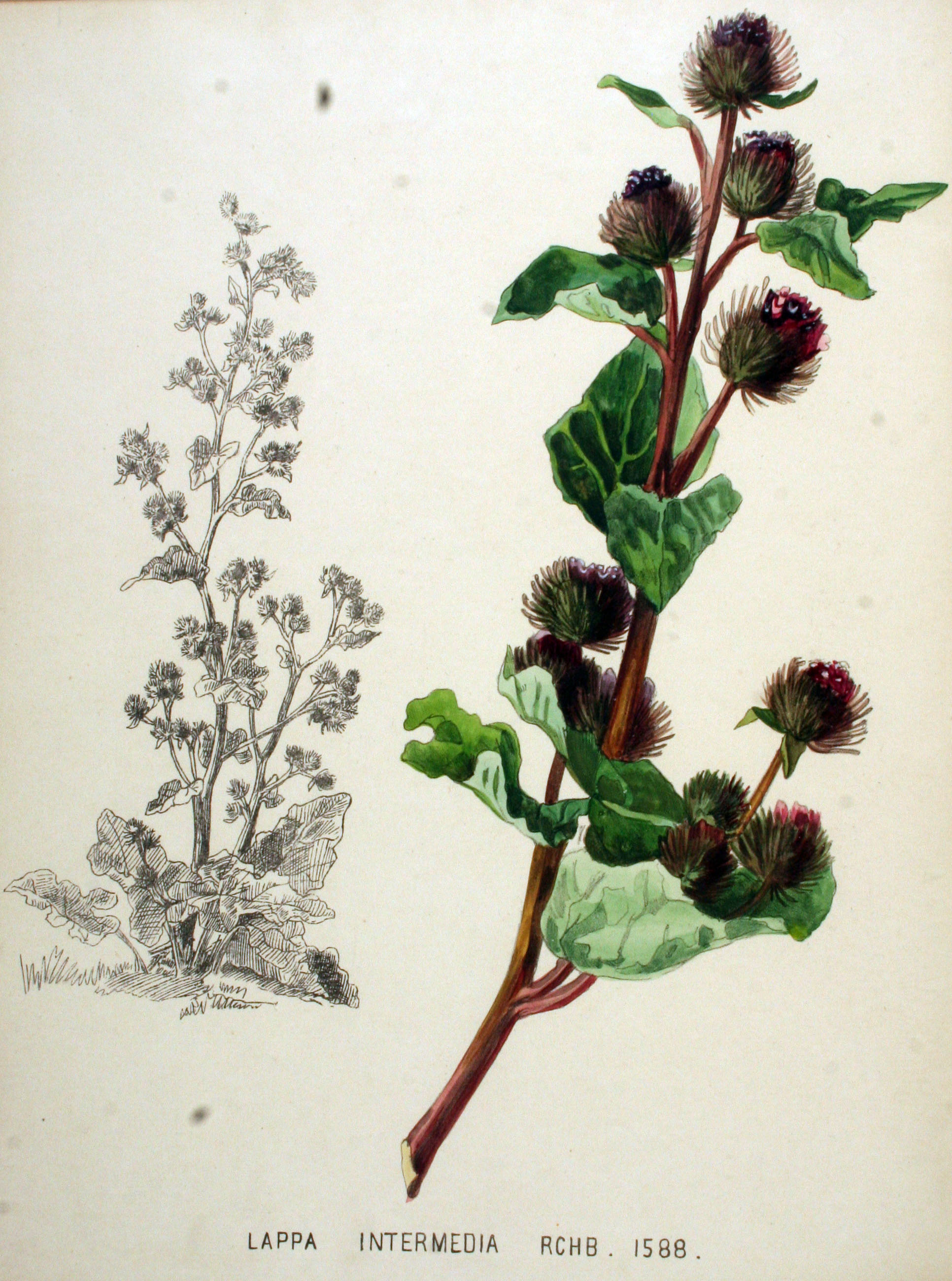 Arctium nemorosum Lej. (Syn. Lappa intermedia Rchb. f.)